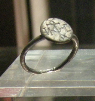 Anello d'argento sigillare e beneaugurale, vi-vii sec., con monogramma greco su croce